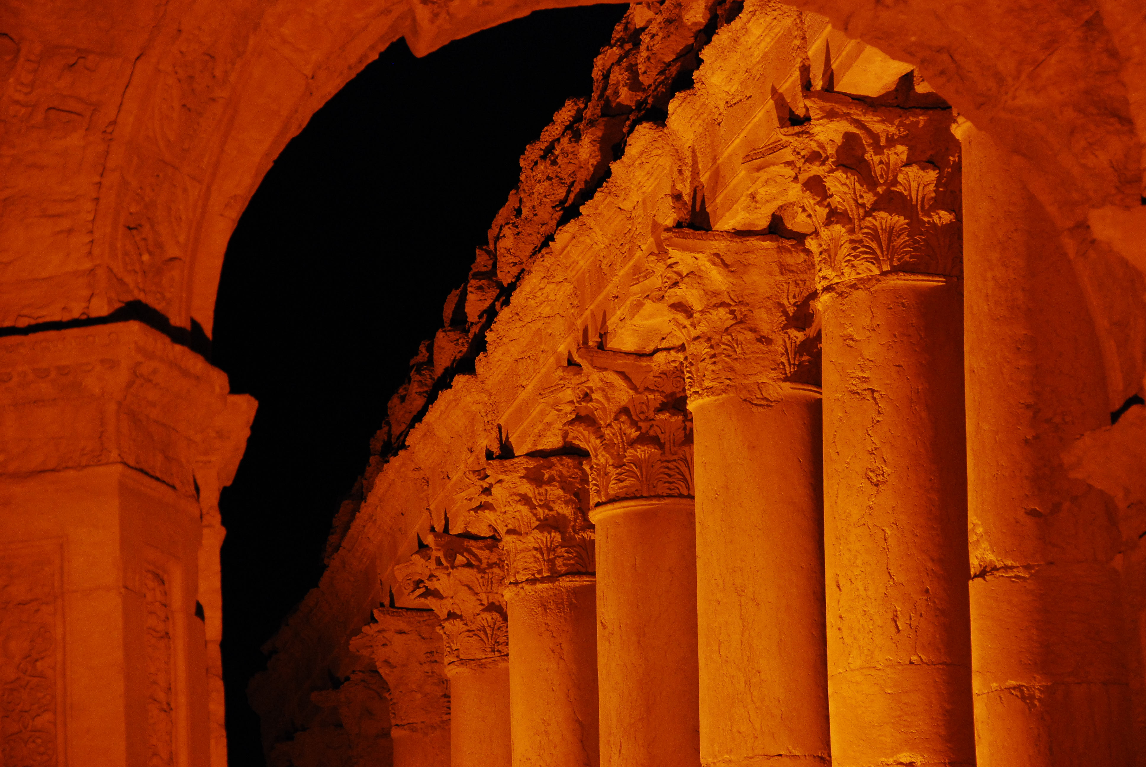 L'Avinguda Columnada, de més d'un km. de longitud amb tot d'edificis públics a banda i banda (Teatre, Temple de Nebo, Àgora, Nimfeu, Tetrapylon,...).